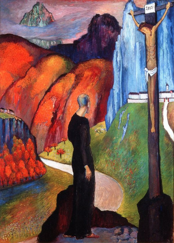 Marianne von Werefkin, Der Mönch", 1932. Modell für den Mönch stand der Begleiter der Malerin, Ernst Alfred Aye